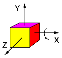 Non commutativité de la rotation d'un cube